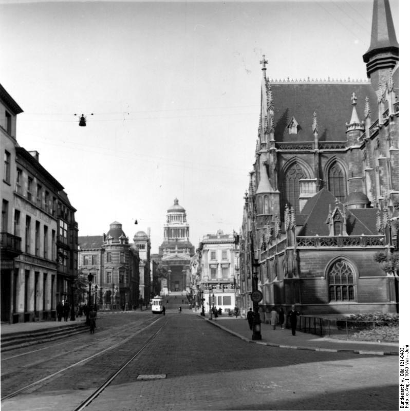 Brüssel 1940